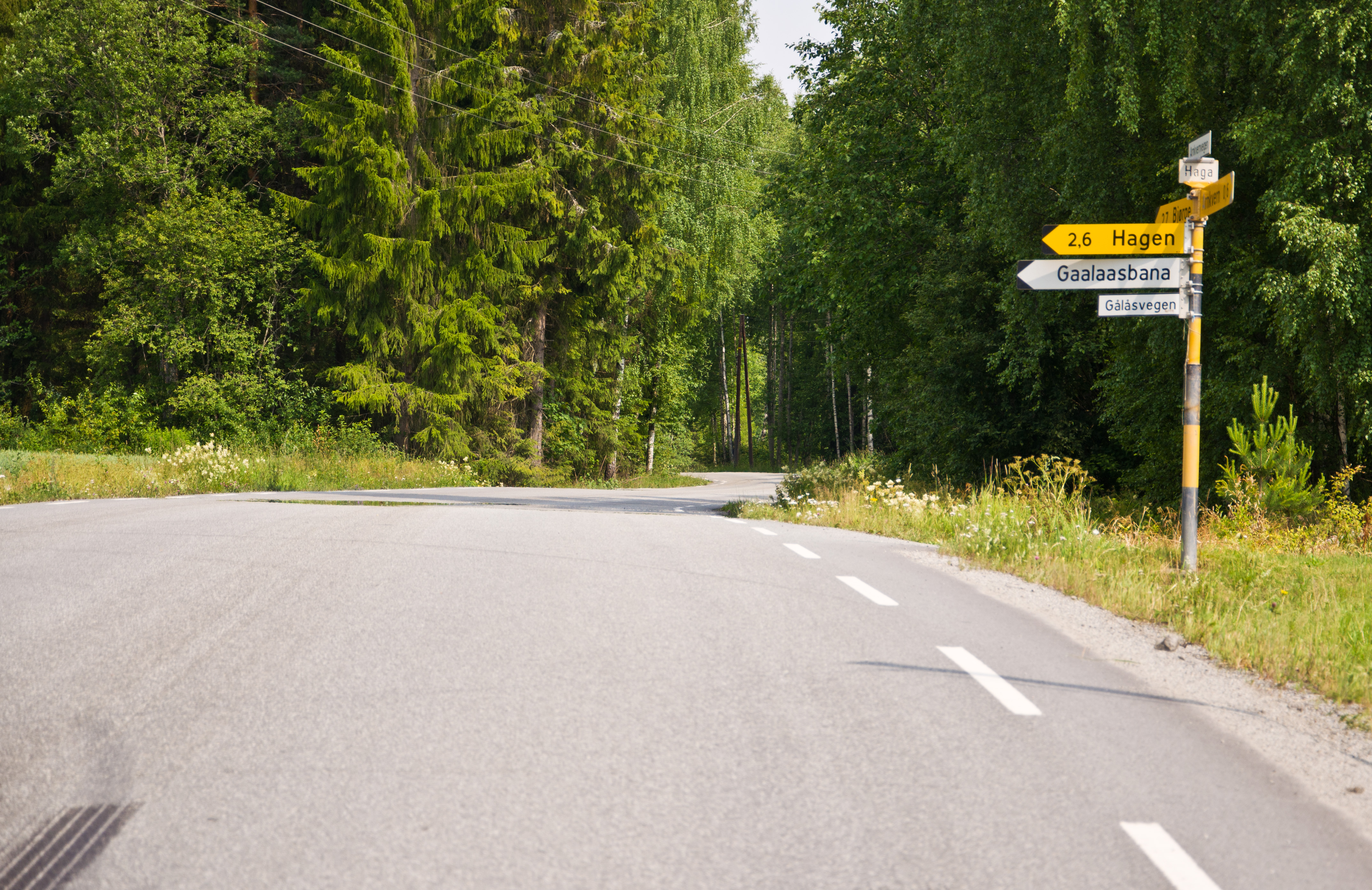 Fylkesvei 1778 (tidl. 91) Arnkvernvegen, ved Haga, krysset med Gålåsvegen